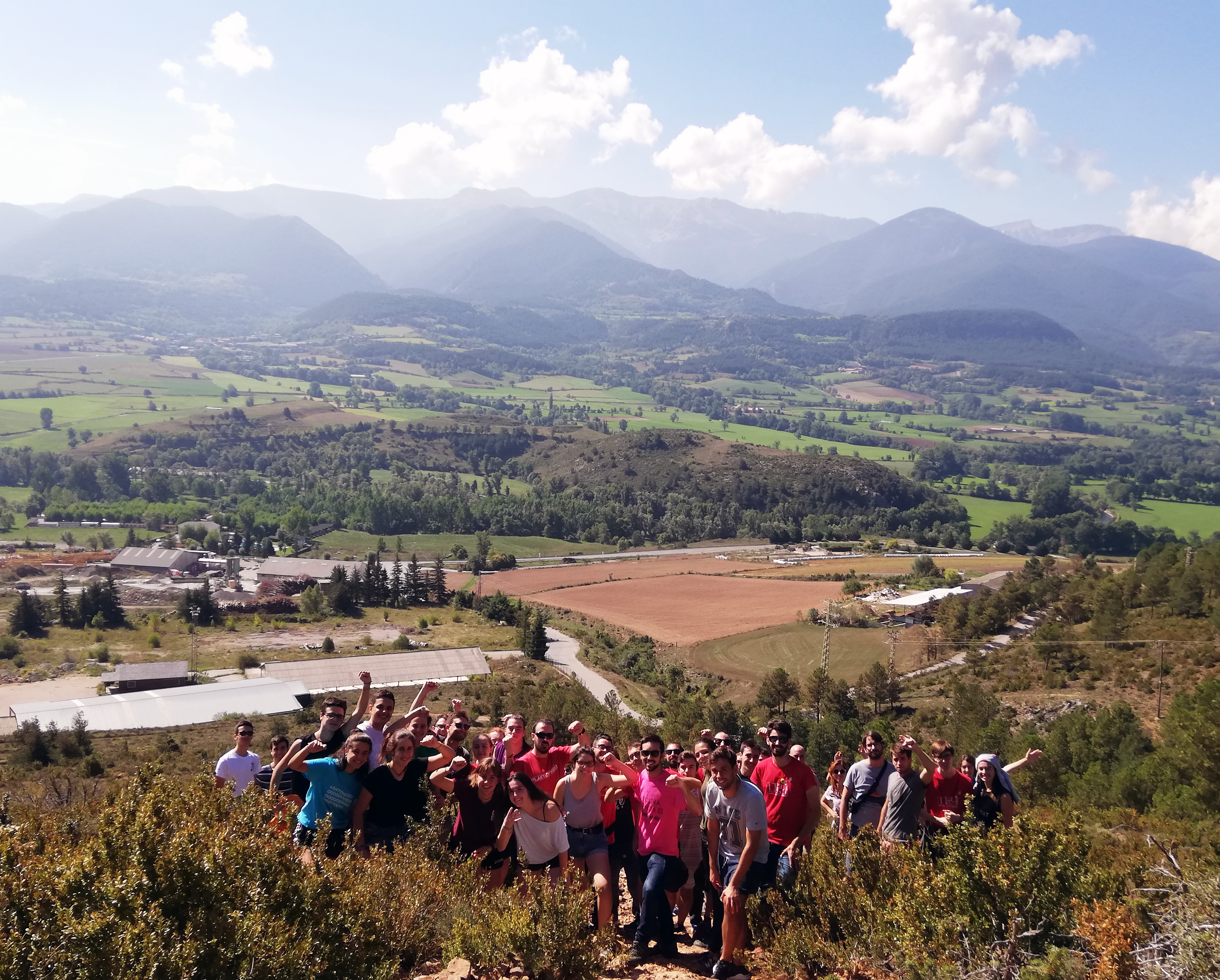 Militants del Jovent Republicà a La Cerdanya per una Escola de Formació